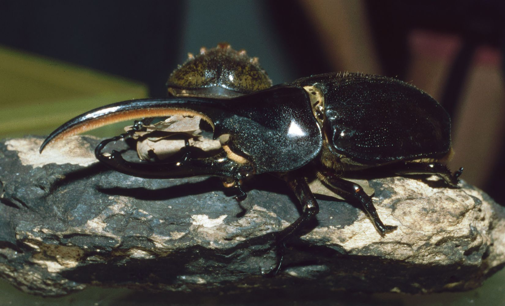 Dynastes hercules — Herkuleskäfer Blatthornkäfer (Scarabaeidae). Jardín de las Mariposas, Monteverde Cloud Forest Reserve, Cordillera de Tilarán, Puntarenas Province, Costa Rica.